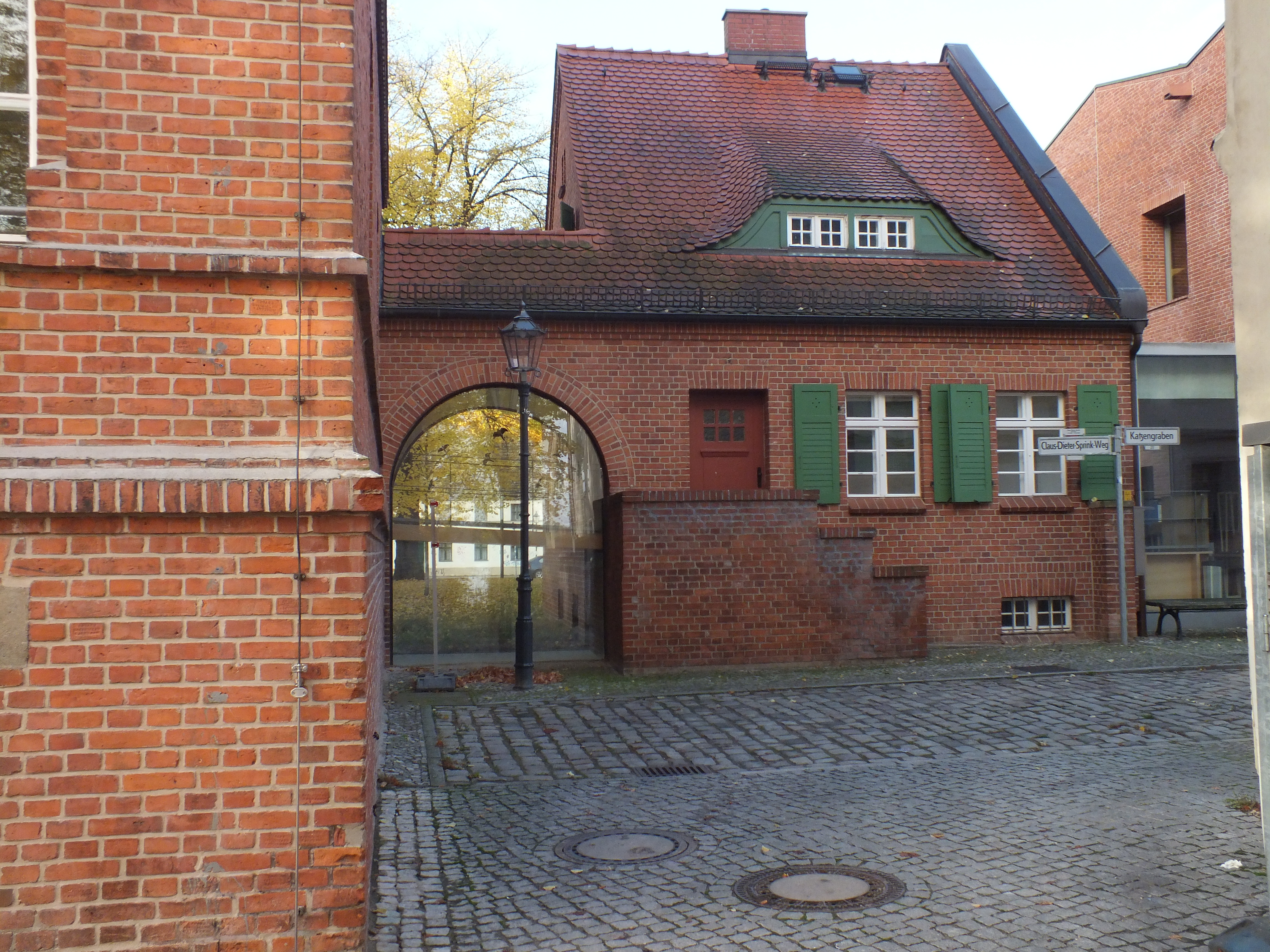 Straße in Berlin-Köpenick